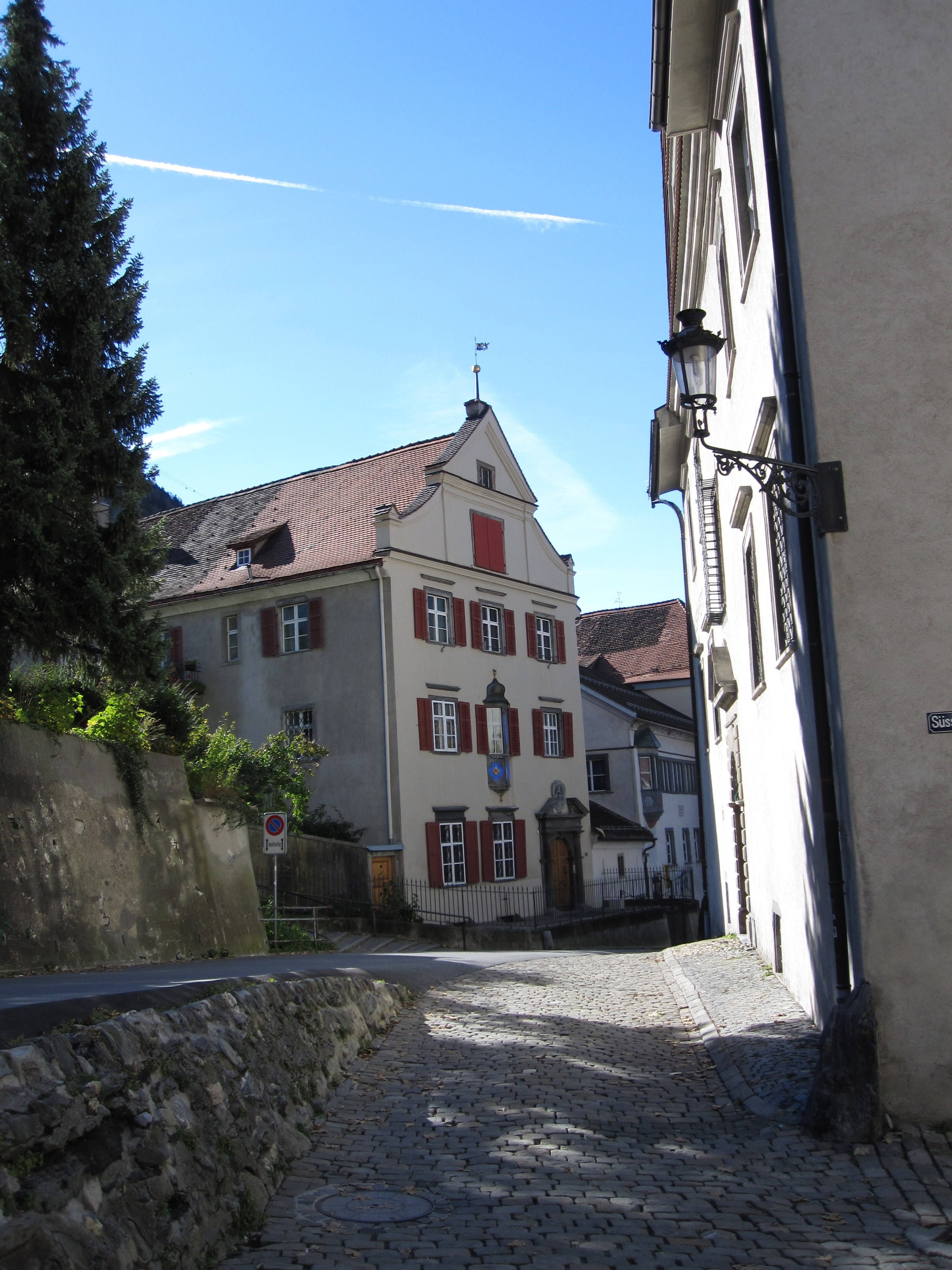 Oberer Spaniöl in Chur (Kanton Graubünden, Schweiz)